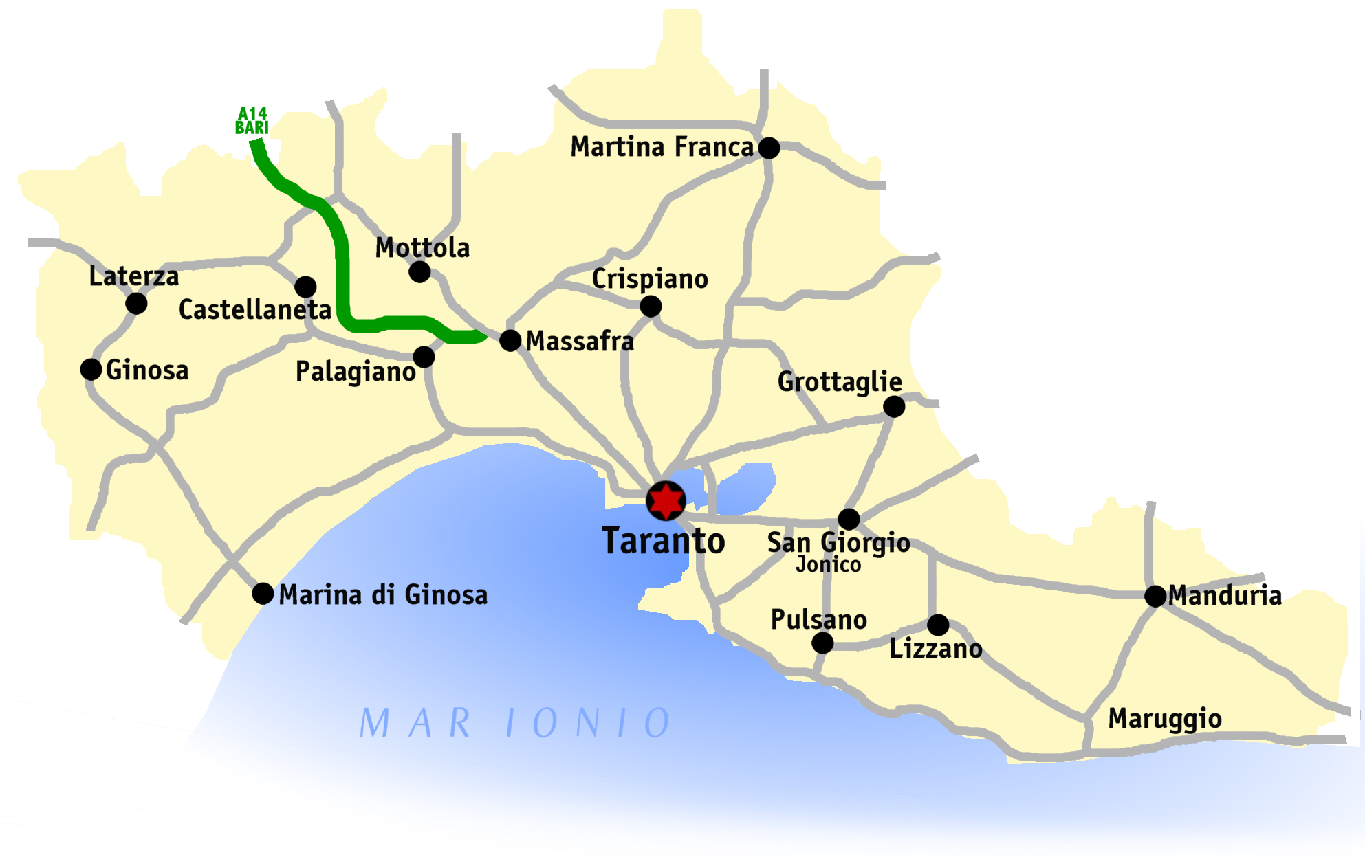 Kaart van de provincie Tarente